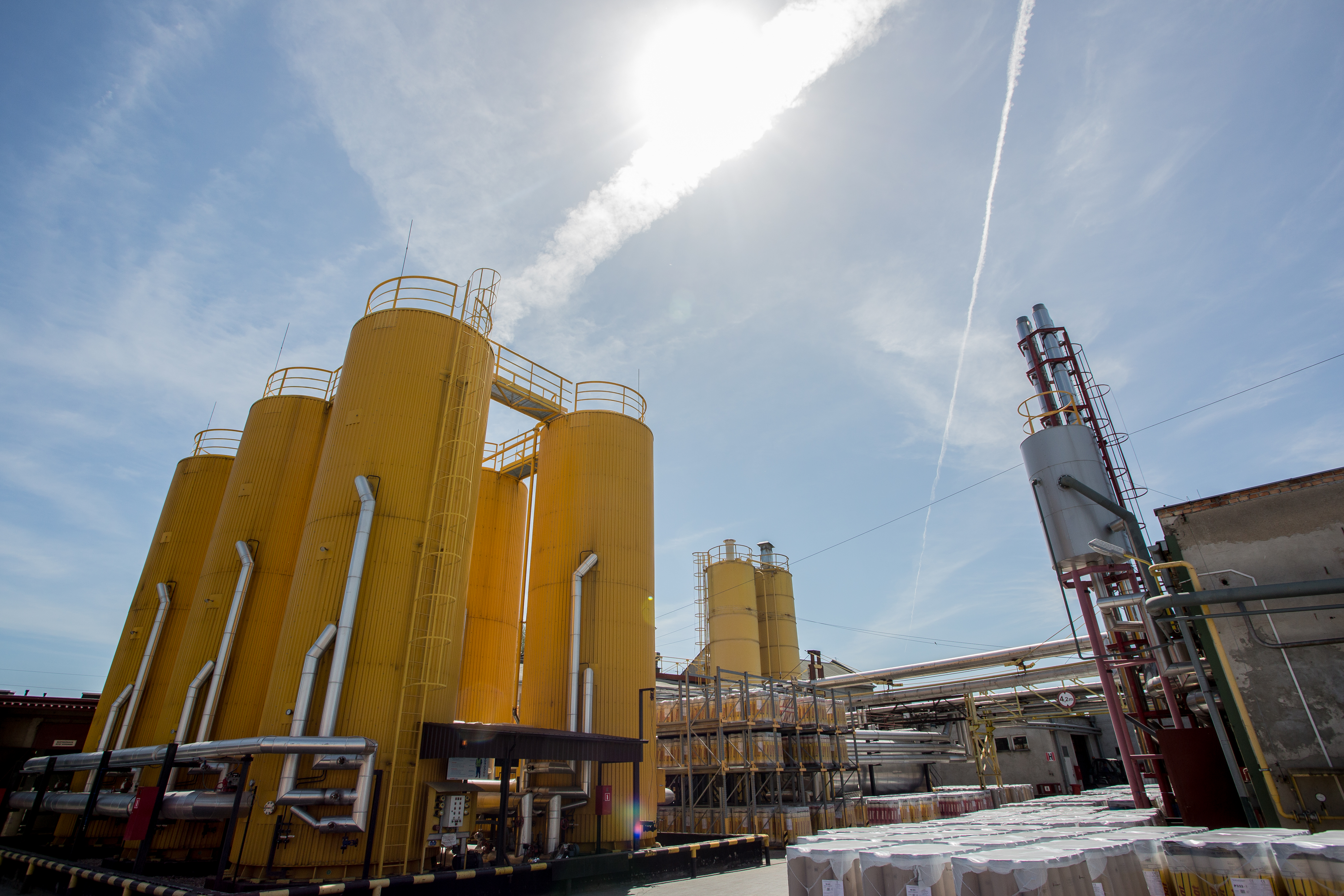 Fabryka Izolmatu w Gdańsku.